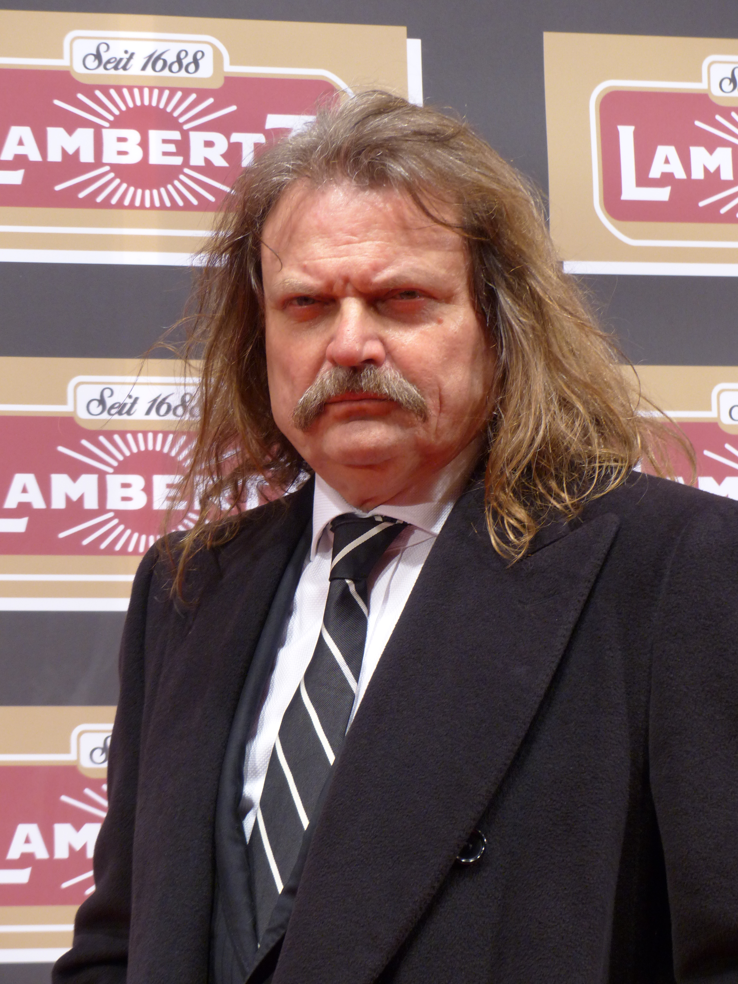 Leslie Mandoki bei der Lambertz Monday Night, im Februar 2016.